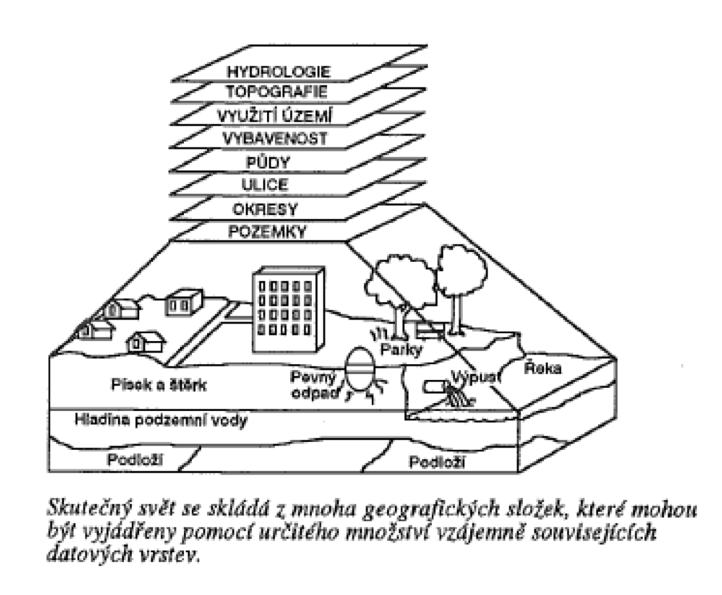 Skládání vrstev [7]